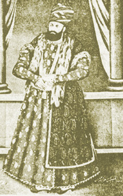 ابراهیم خان کلانتر